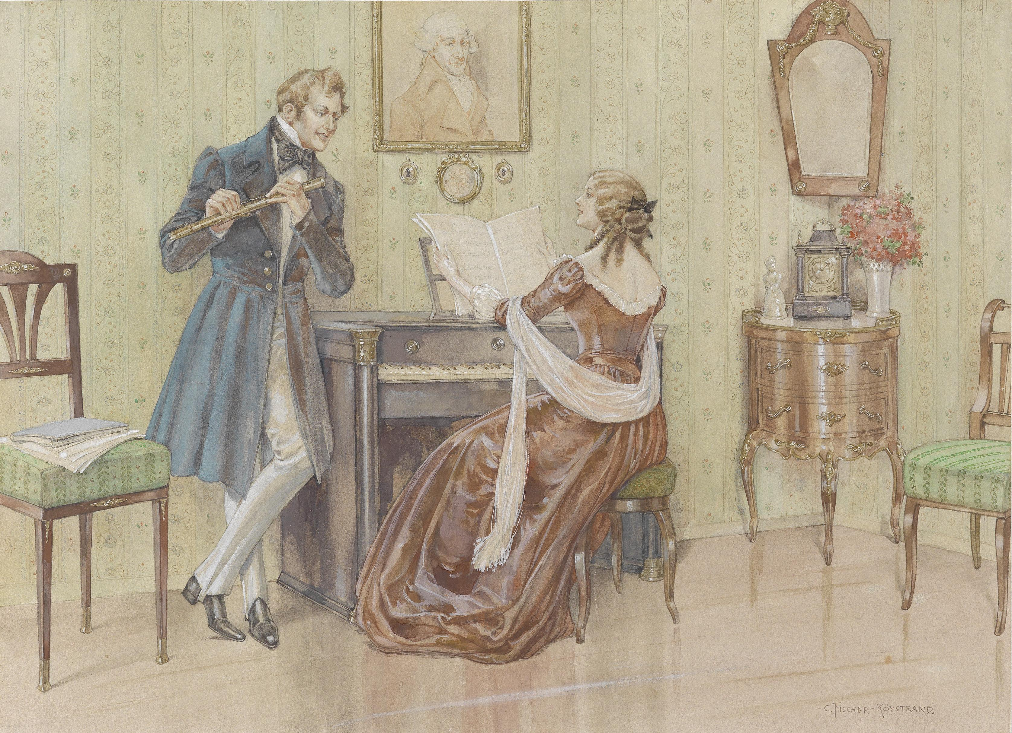 Hausmusik